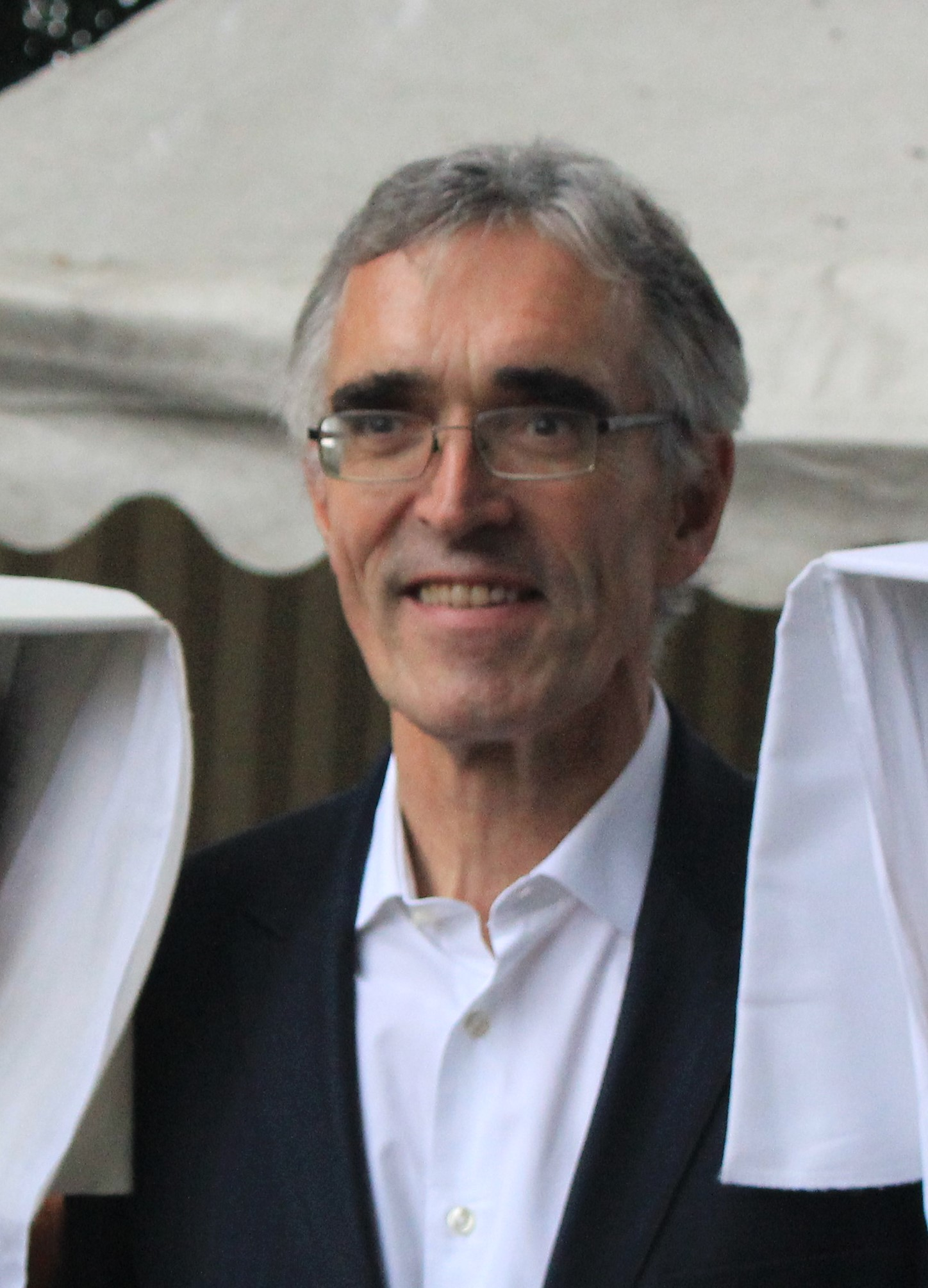 sous-préfet du Morbihan Jean-Francis Treffel lors du festival interceltique de Lorient 2015